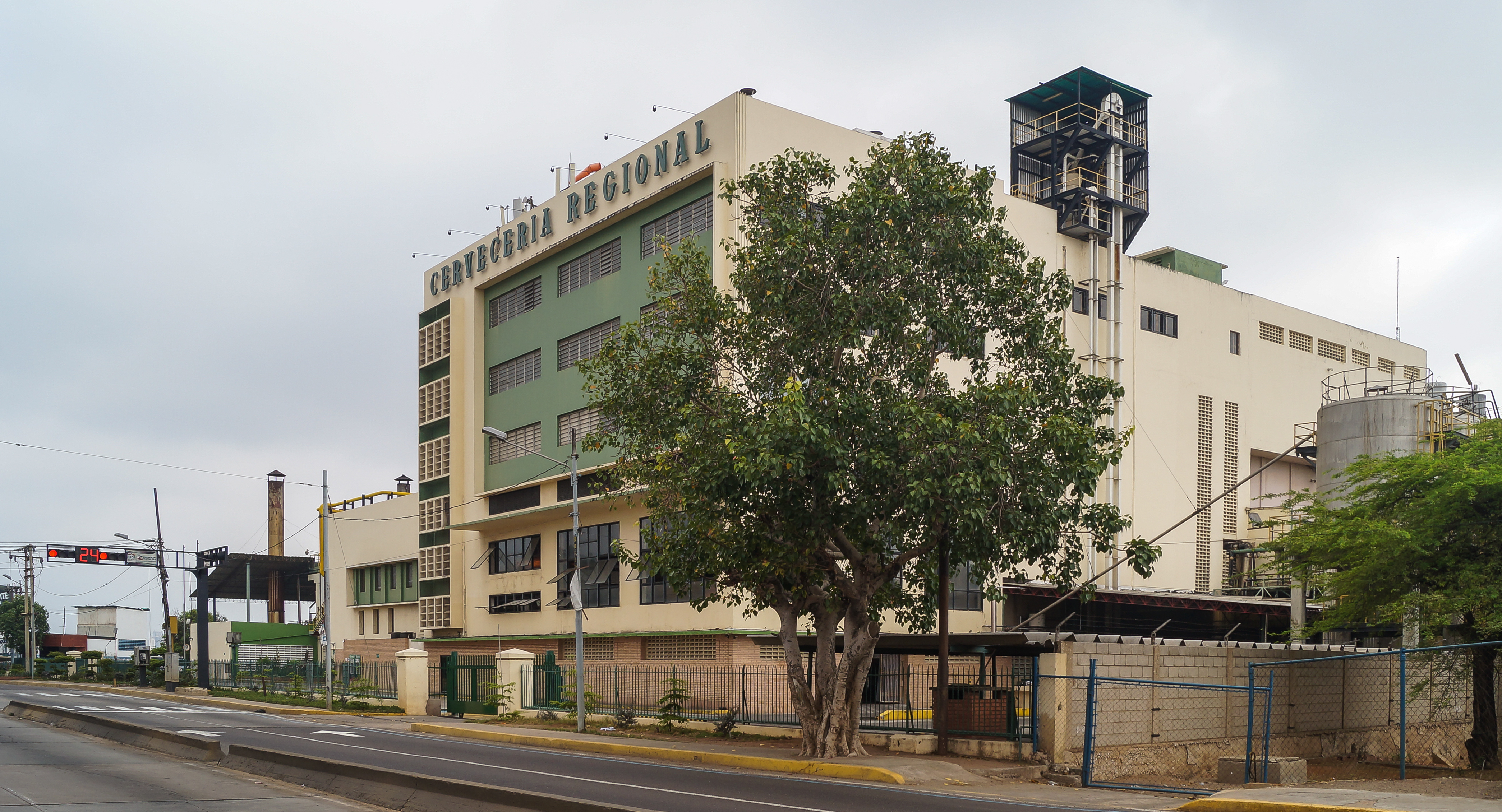 Conjunto de edificios de uso industrial que alberga todas las áreas requeridas para la producción de cerveza y ocupa una extensión de terreno plano con conexión directa al Lago de Maracaibo. En su interior destaca una torre de siete pisos provista de ventanas con protectores solares, construida con estructura de concreto armado, paredes de bloques frisados, puertas y ventanas de metal, madera y vidrio. También cuenta con un amplio sector donde se ubican varios tanques cilíndricos metálicos. La parcela está delimitada por una cerca que permite la visibilidad hacia el interior. Maracaibo.